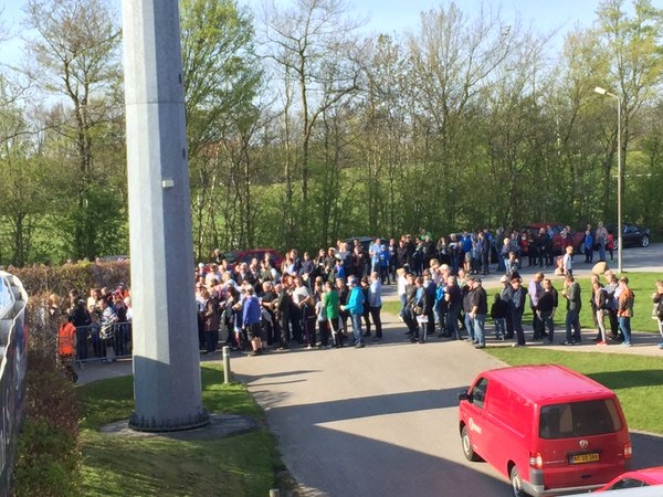 Kø før Superliga kampen imod Esbjerg d. 6. maj 2016 på Sydbank Park i Haderslev.